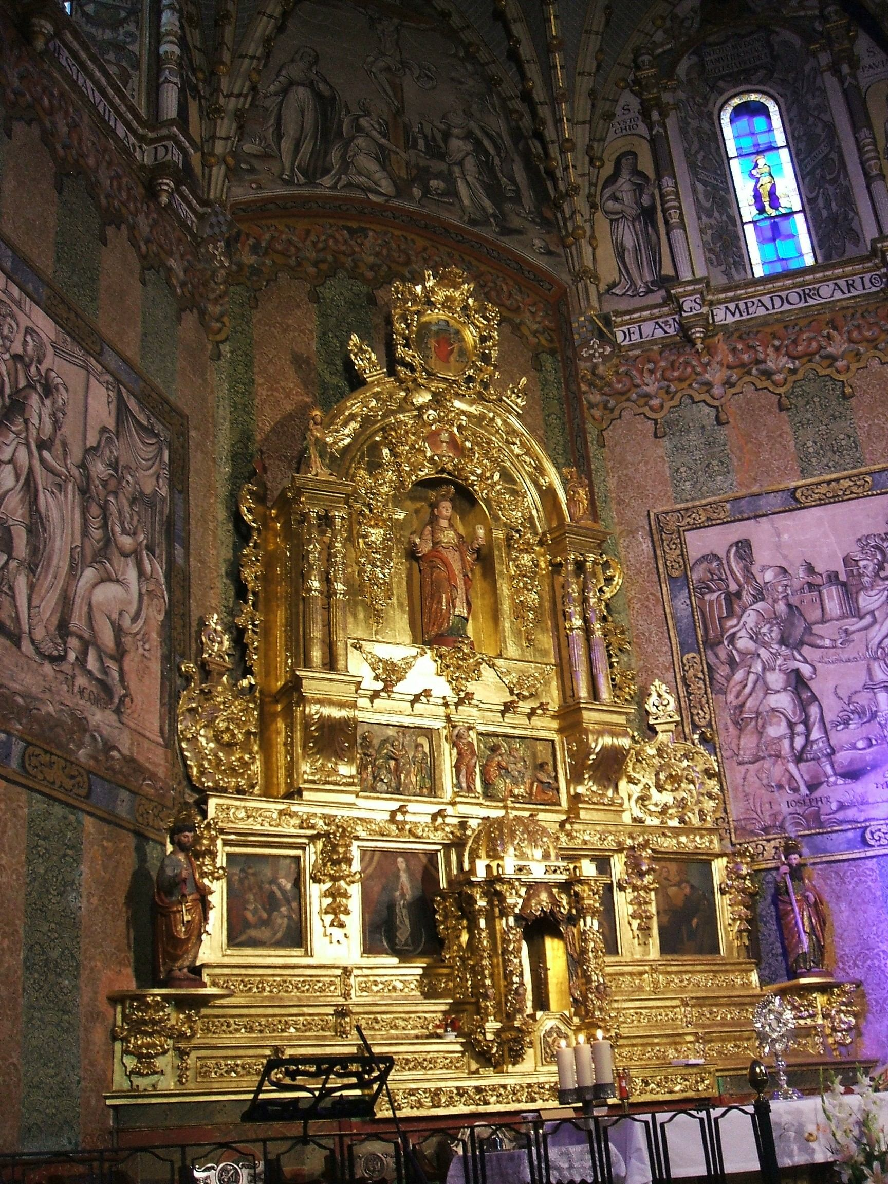 Retablo mayor barroco (s-XVIII) de la iglesia del Monasterio de Santa María Magdalena (MM Agustinas), en Medina del Campo, Valladolid, Castilla y León, España